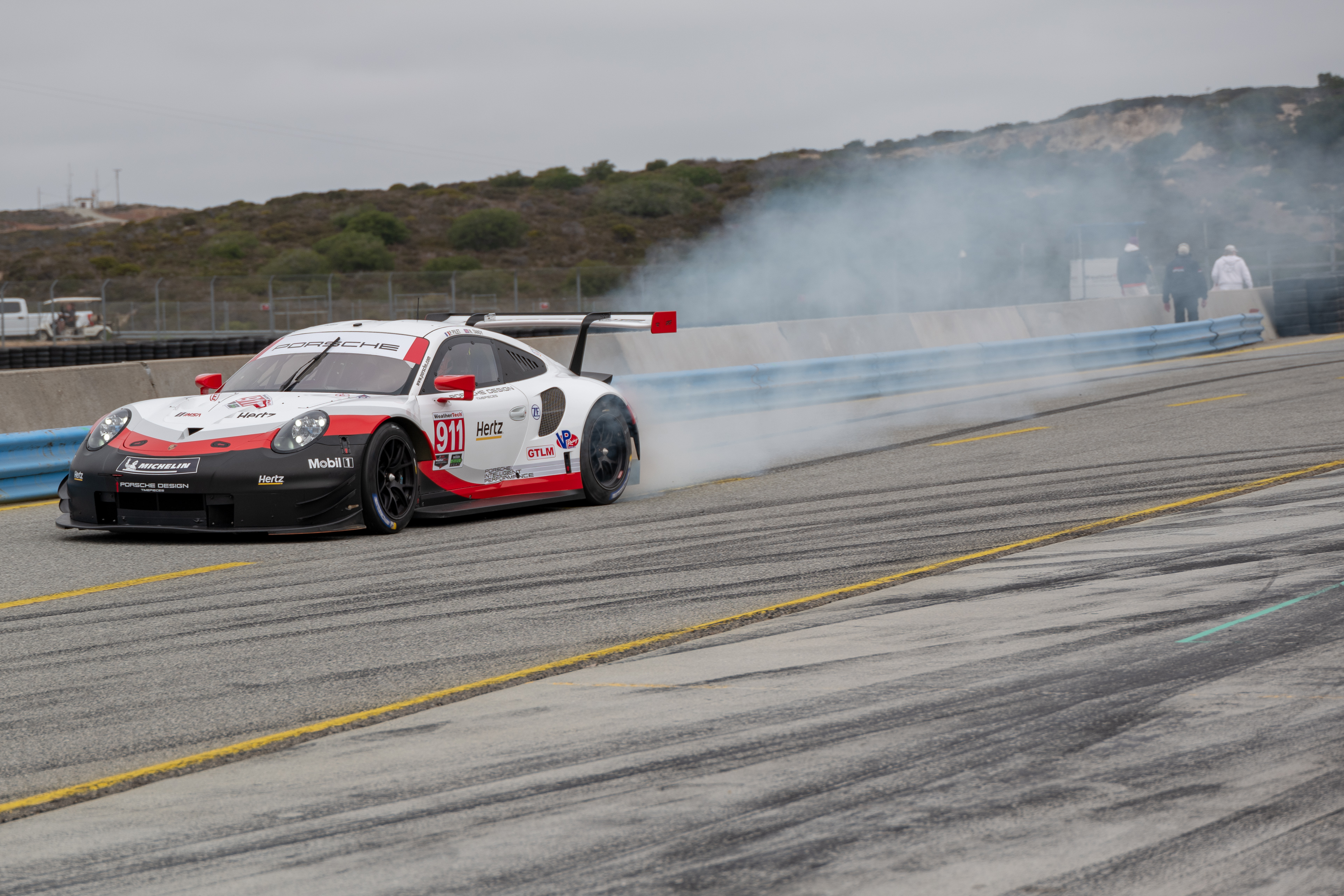 Rennsport Reunion VI